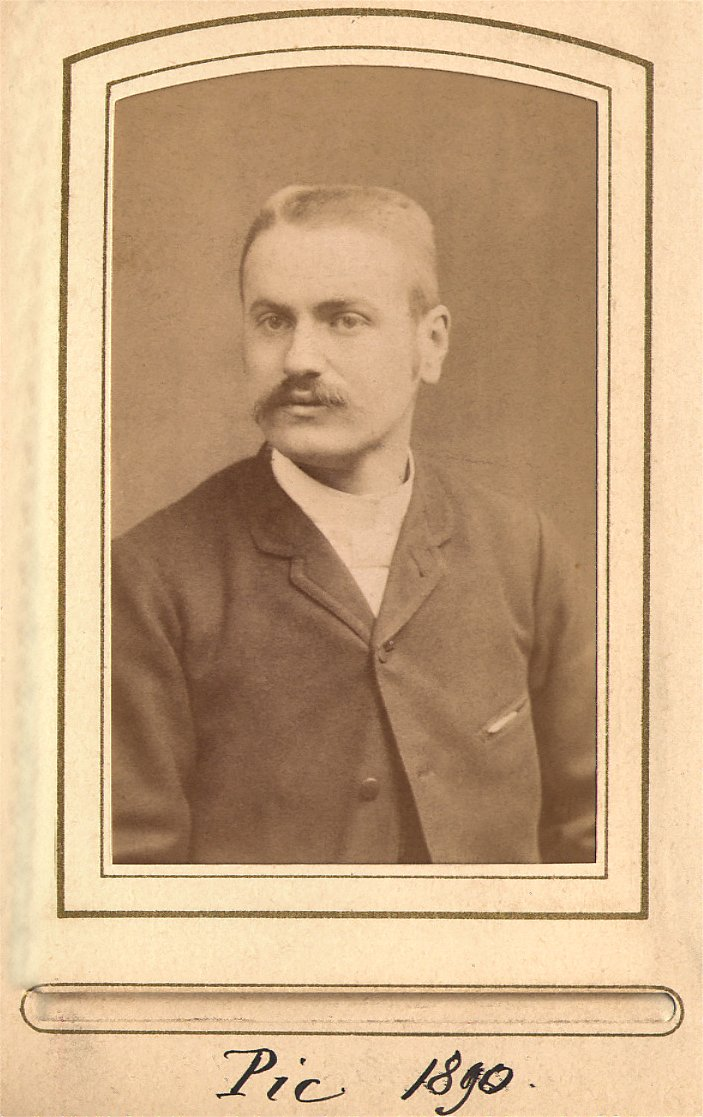 Portrait de Maurice Pic en 1890